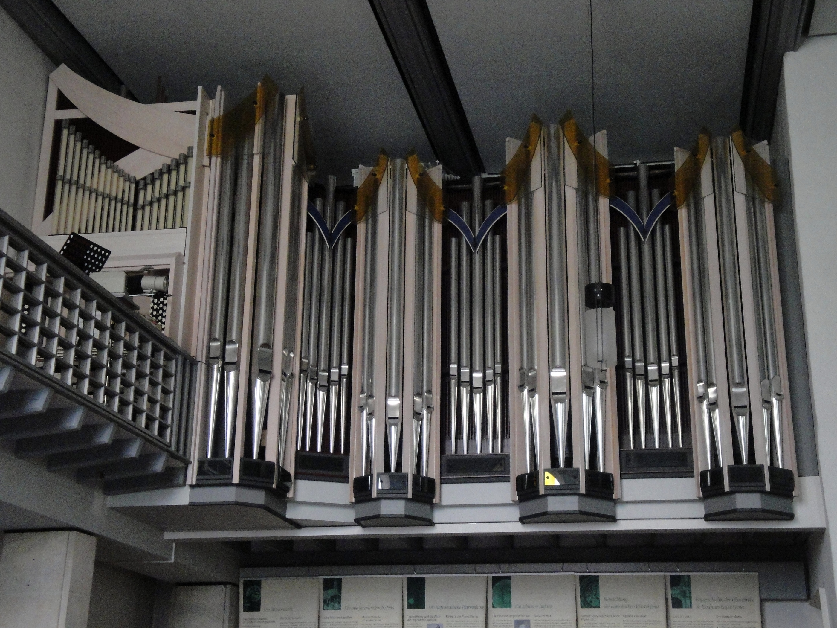 Orgel der St. Johannes Baptist, Jena